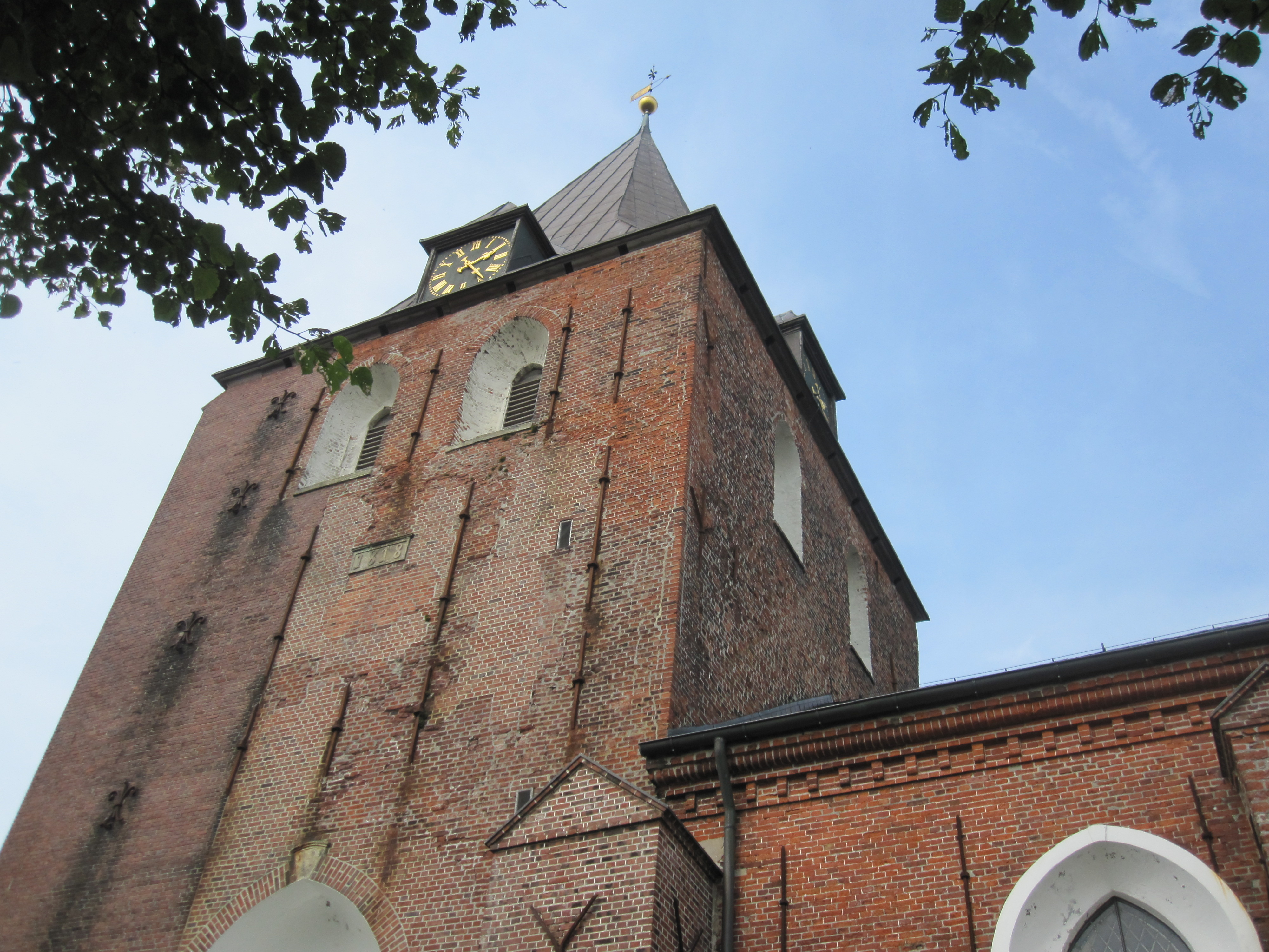 Der Turm der St.-Christian-Kirche in Garding zeigt seine lange und wechselvolle Baugeschichte.